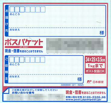 ポスパケットのラベル（2007年前半までのもの）